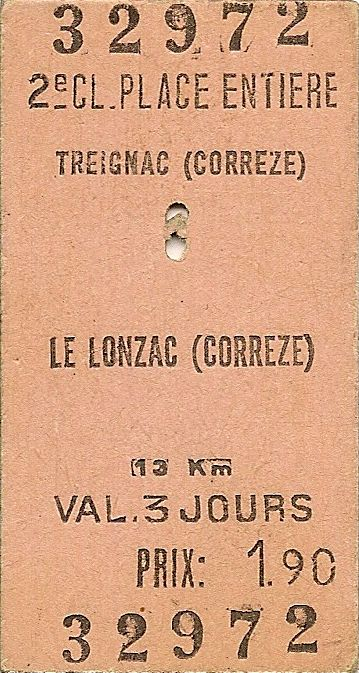 Ticket portant le marquage "1er novembre 1969" au dos, et qui fut utilisé sur la dernière circulation voyageur du POC entre Treignac et Le Lonzac.